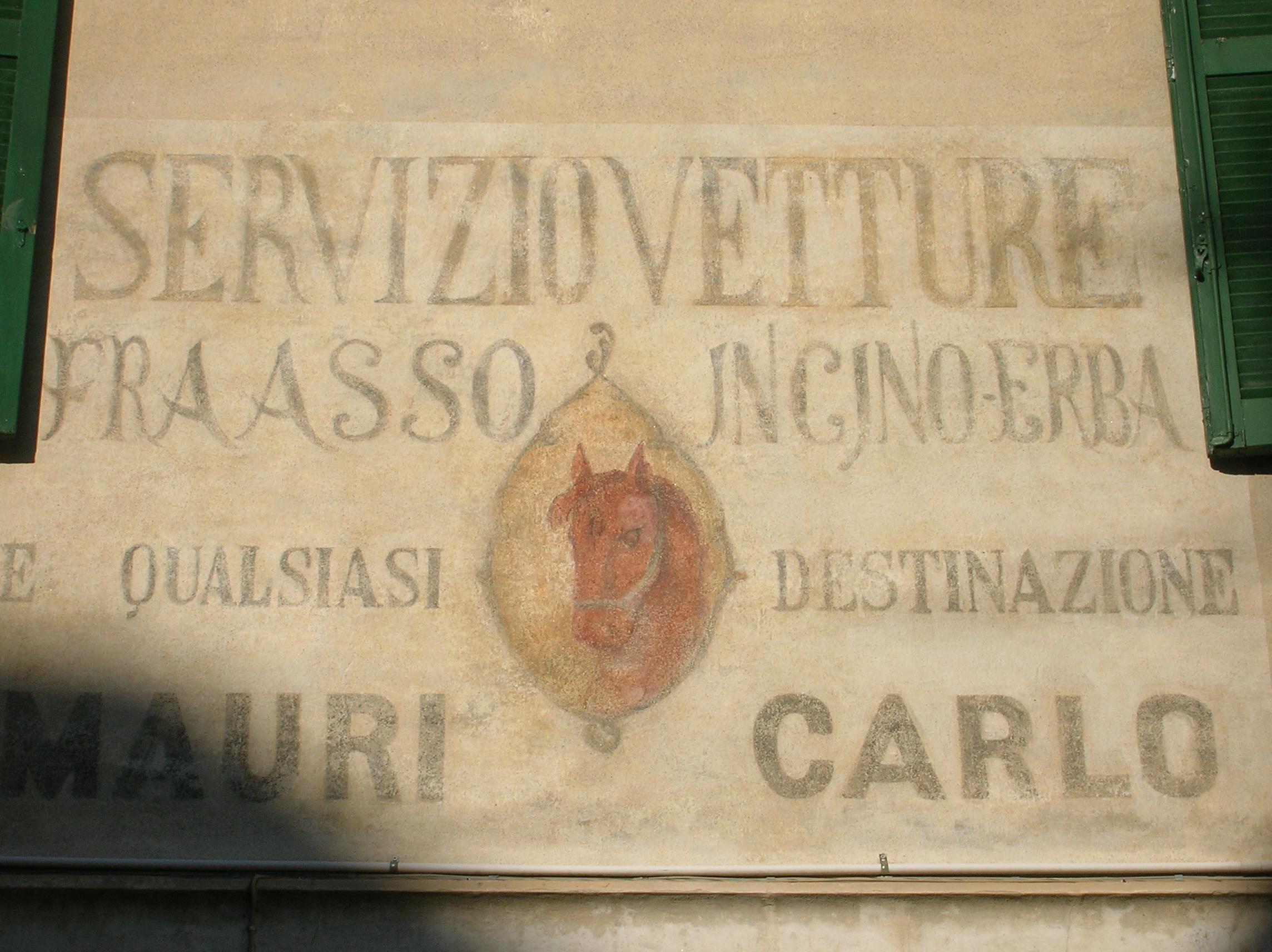 affisso murale del servizio di trasporti fra Asso e Incino, vicino alla chiesa del Santo Crocifisso di Asso